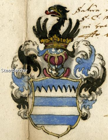 Erb rodu Misseroni (Österreichisches Staatsarchiv, Wien)